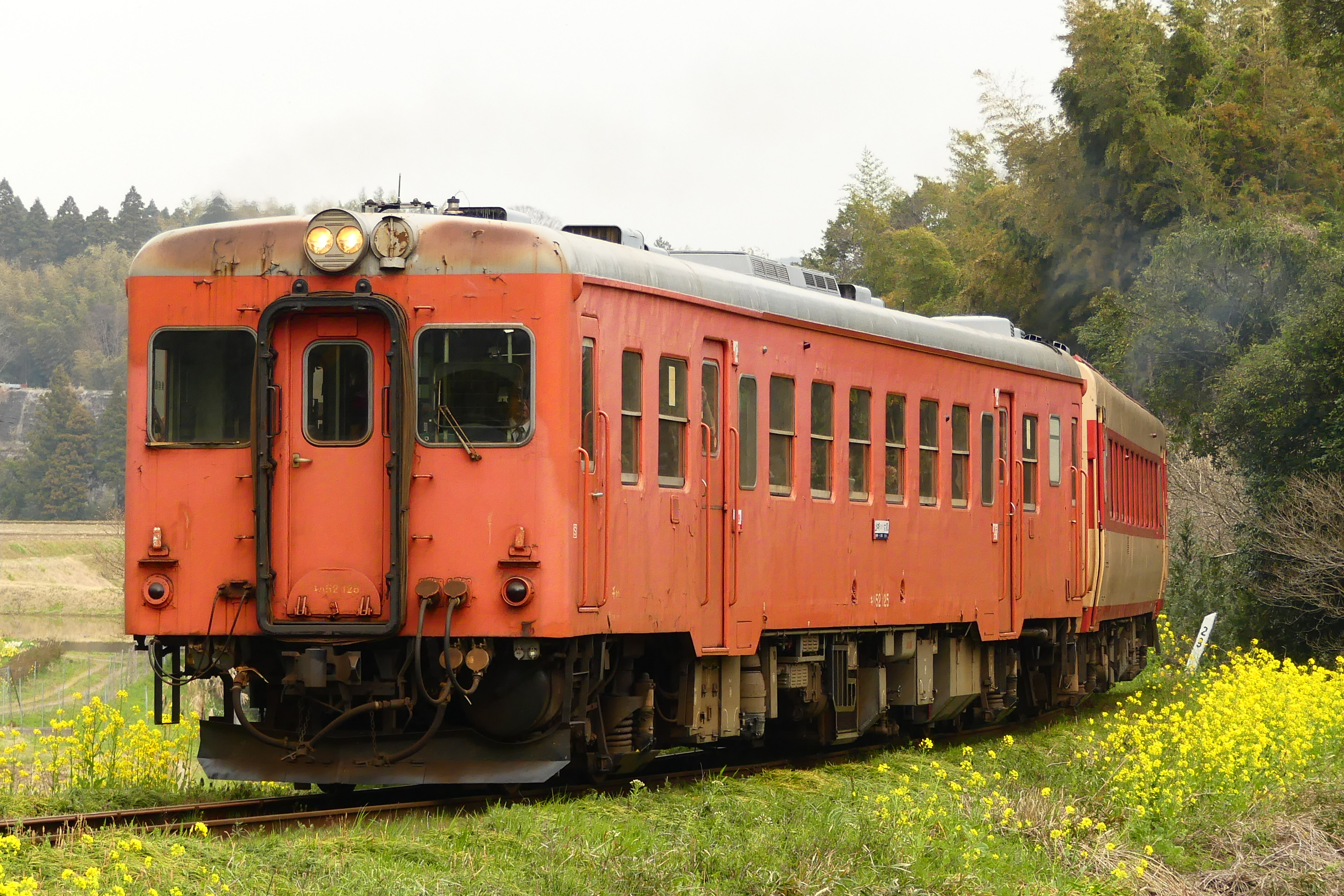 いすみ鉄道線を走行するキハ52形首都圏色